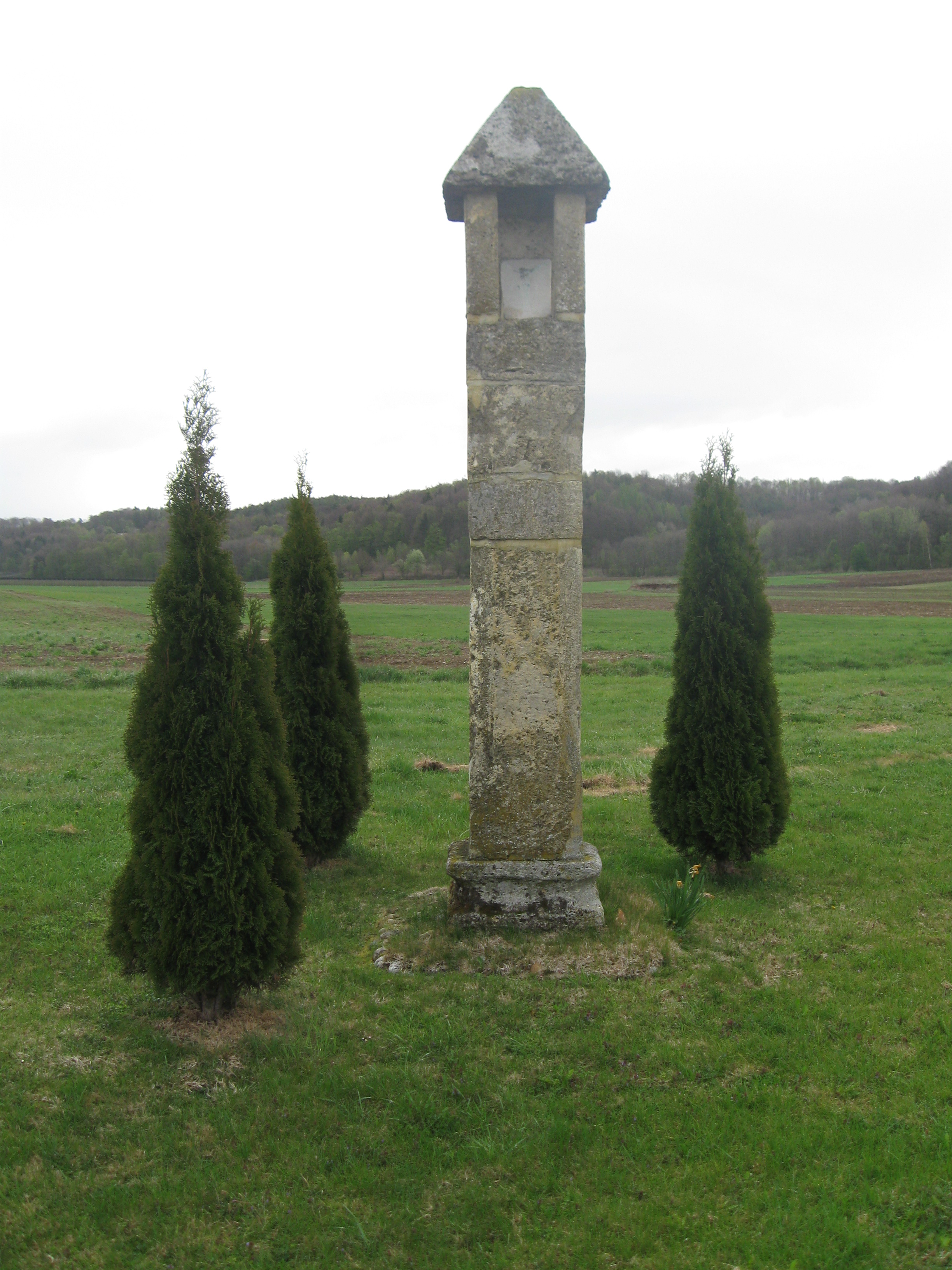 Kužno znamenje v Hvaletincih iz 15. stoletja.